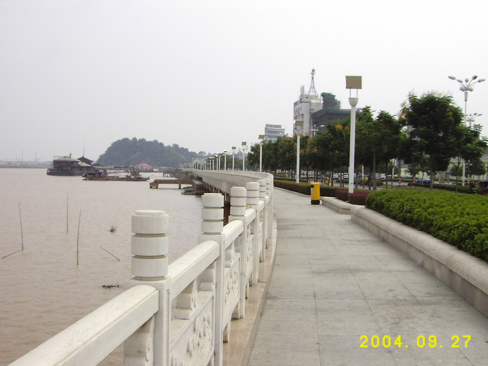 江边